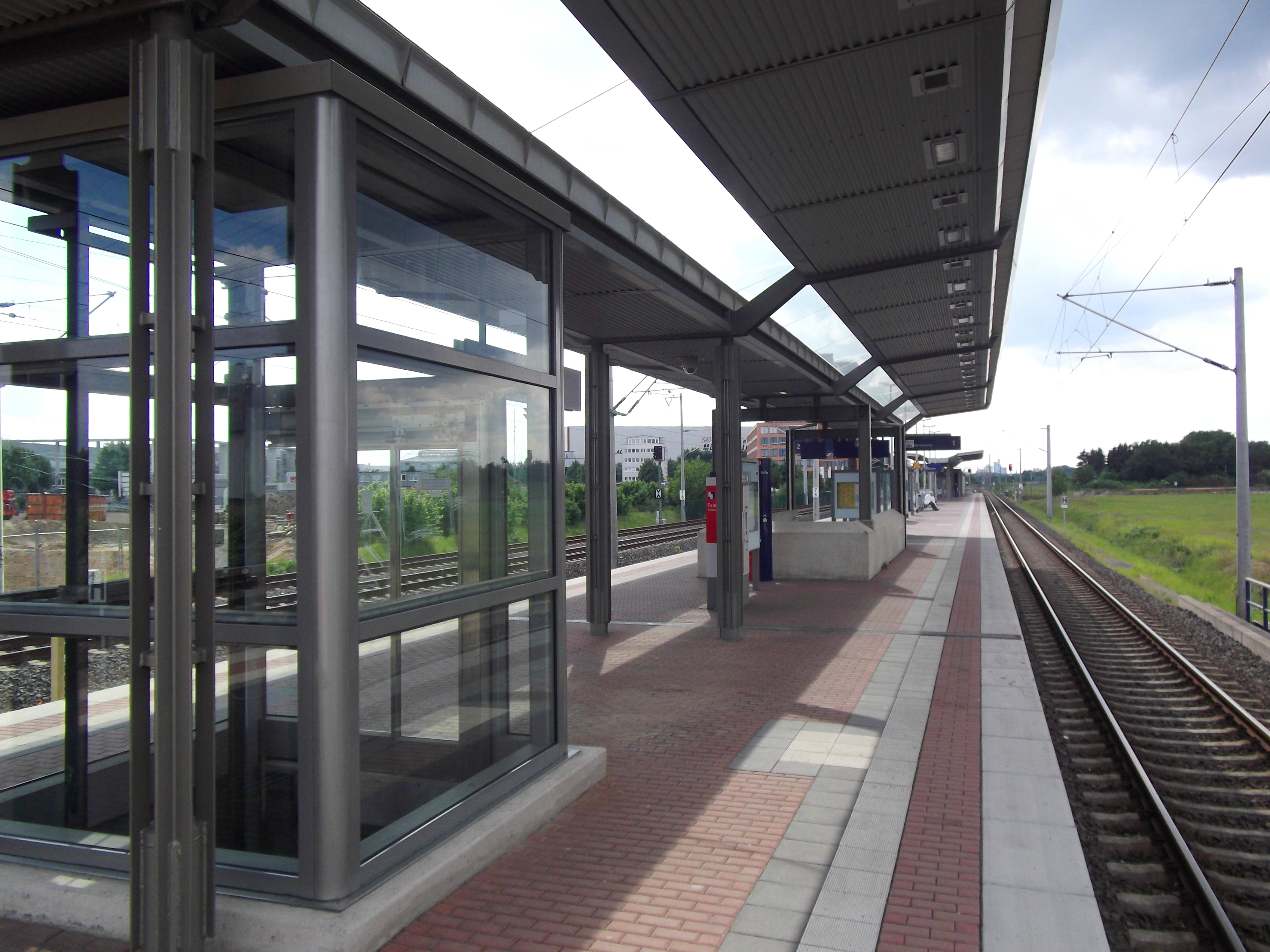 Cologne (Köln), Germany: Bahnhof Köln-Frankfurter Straße